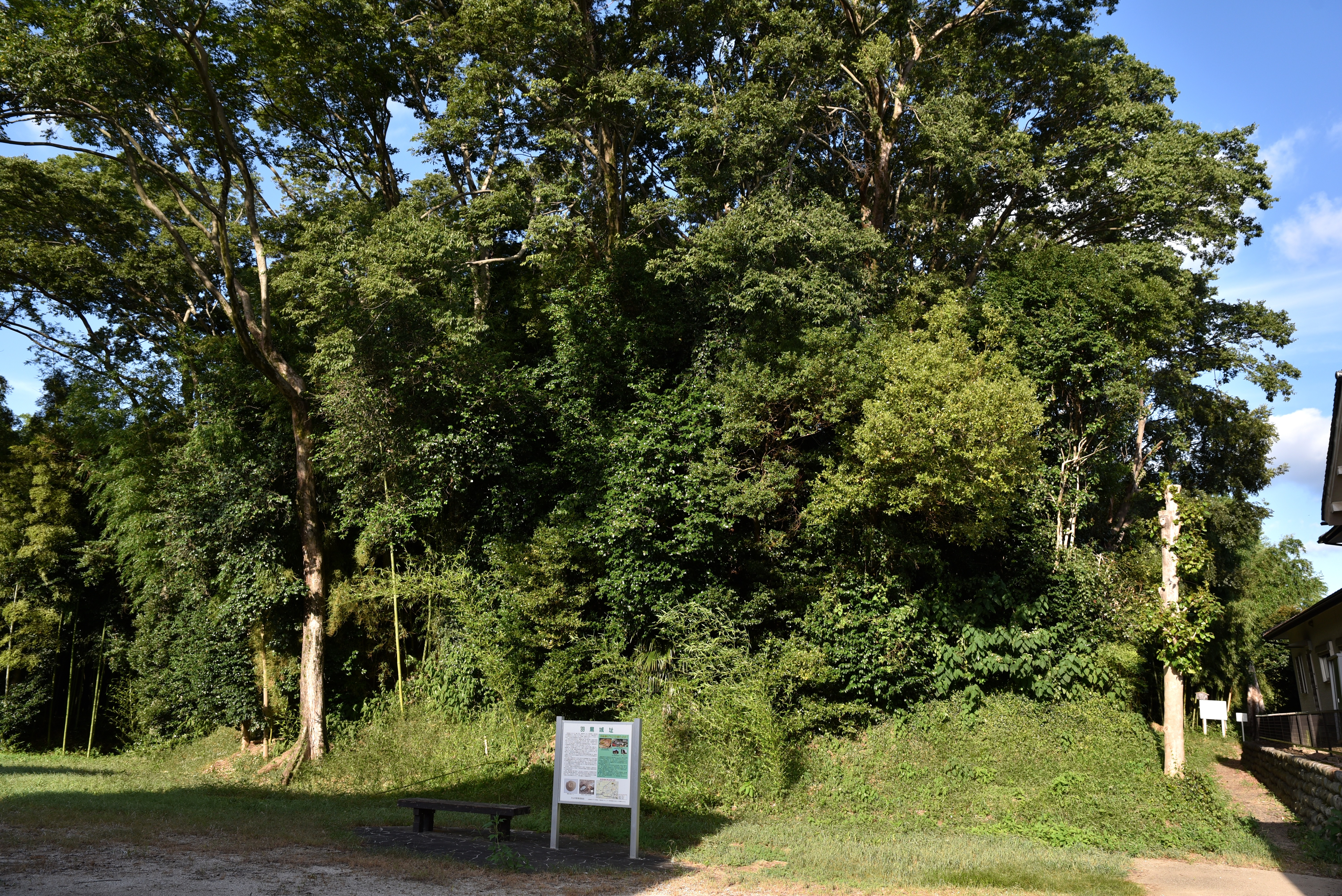 犬山市にある羽黒城址